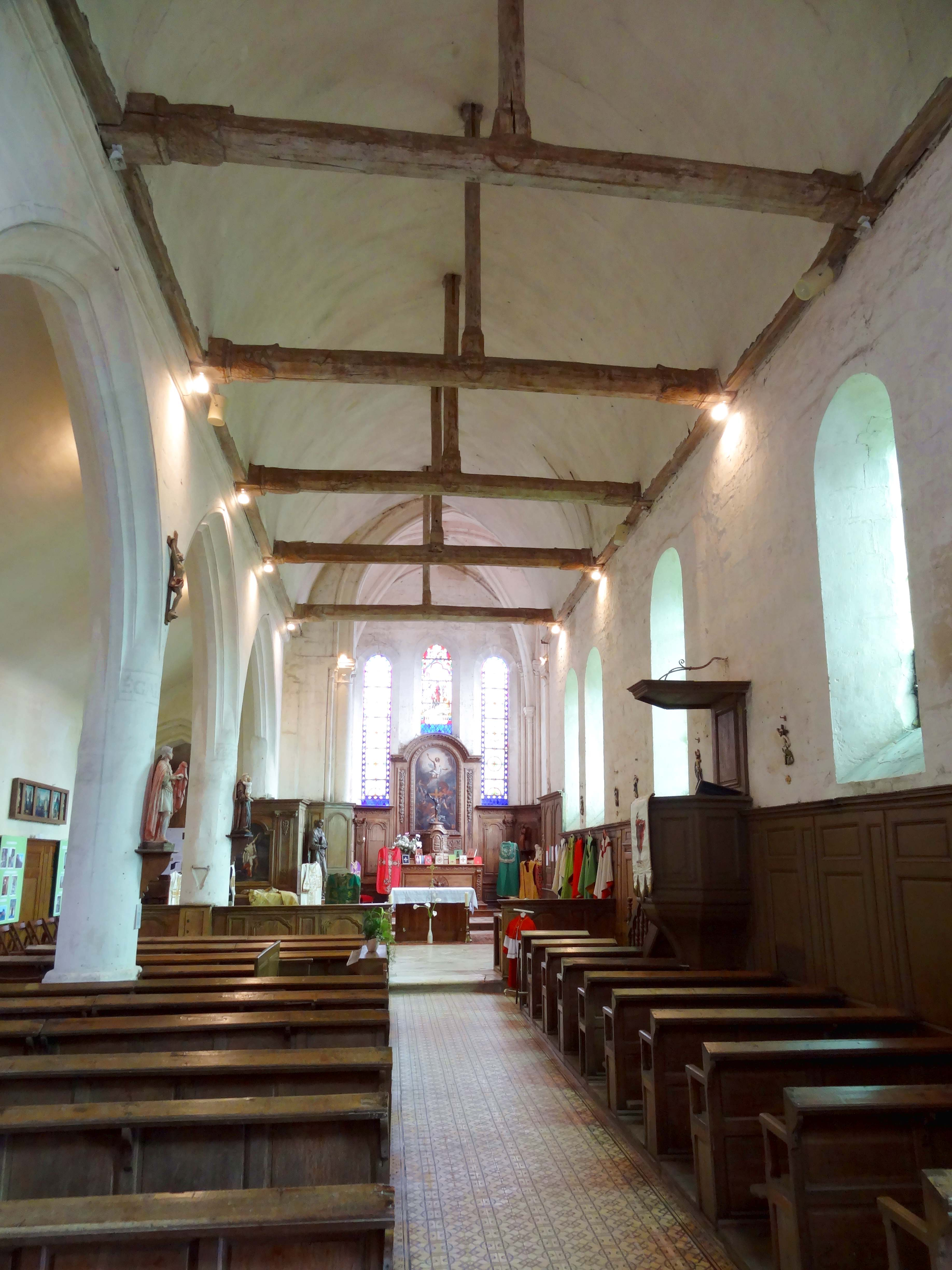 Intérieur de l'église - voir titre.